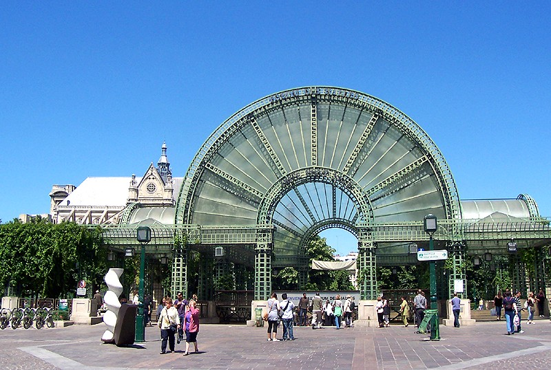 Parigi - Forum les Halles